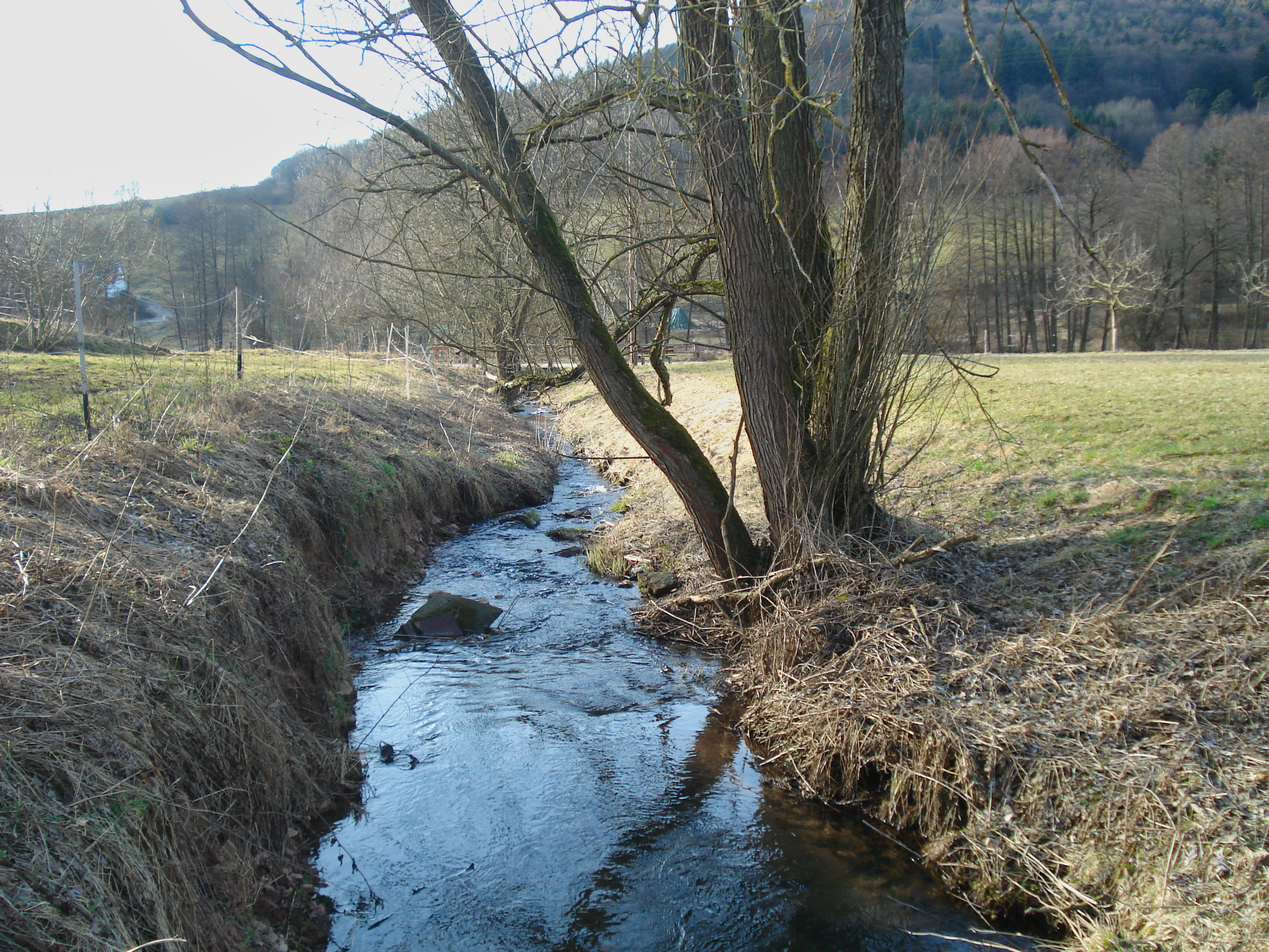 Der Edelbach nach dem gleichnamigen Ort Edelbach